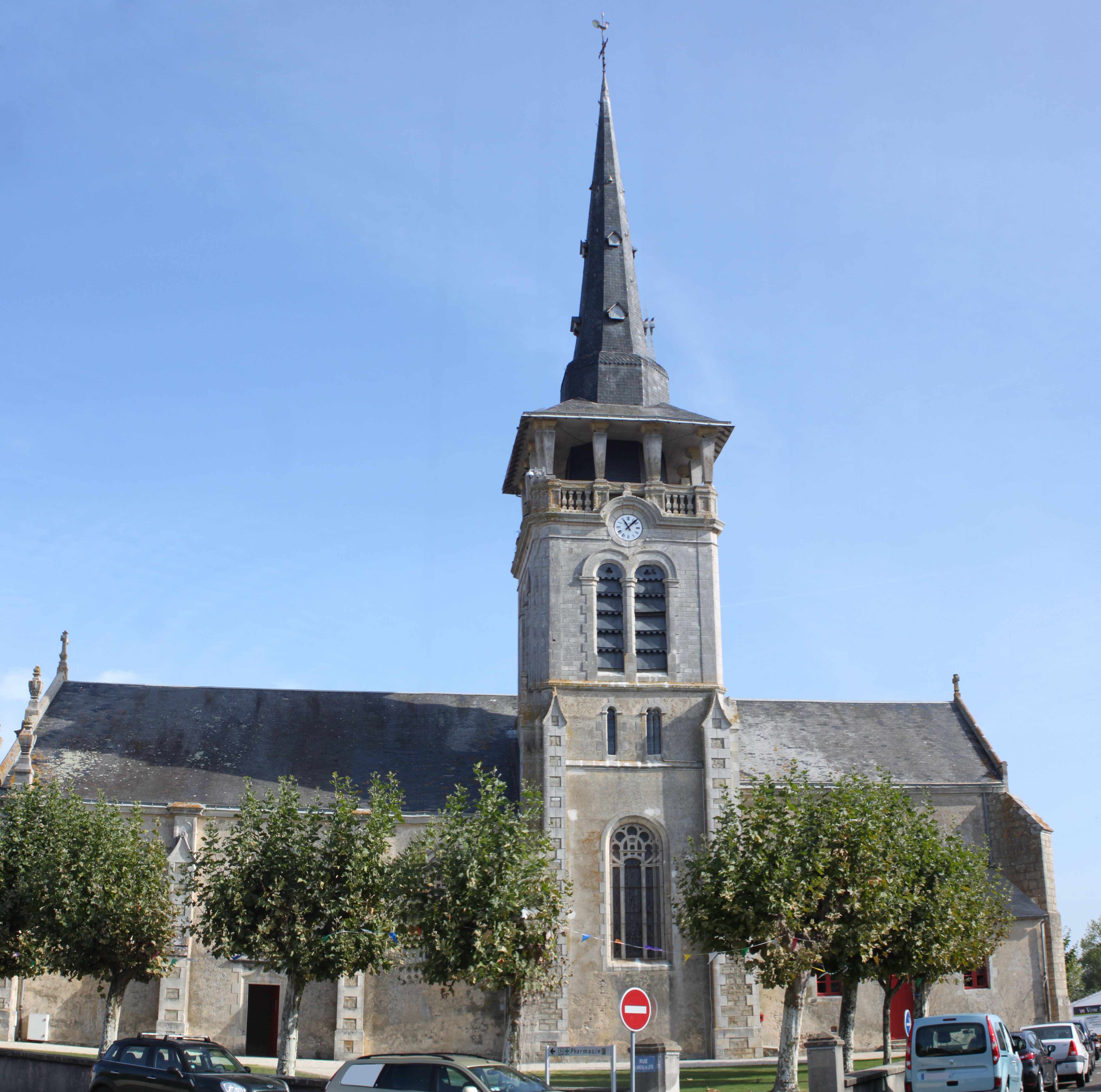 Église Saint-Martin-de-Vertou (1600, XX°), Fr-85-Île-d'Olonne.